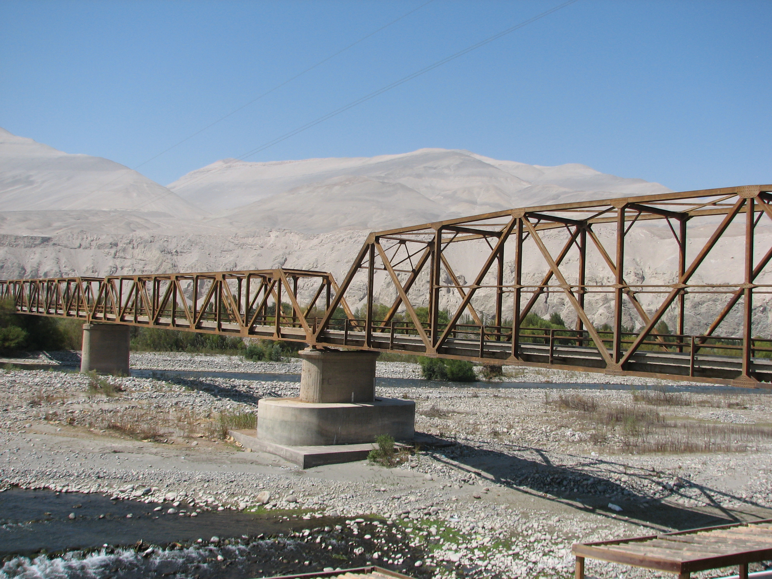 Puente Punta Colorada/Punta Colorada, Uraca District, Arequipa Region, Peru.